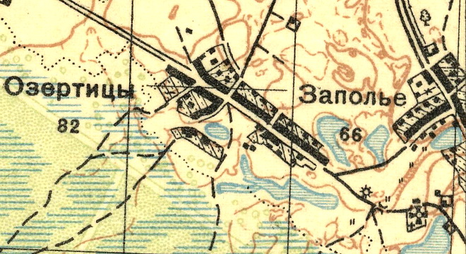 Топографическая карта Ленинградской области, квадрат О-35-23-Г (Волосово), деревня Озертицы